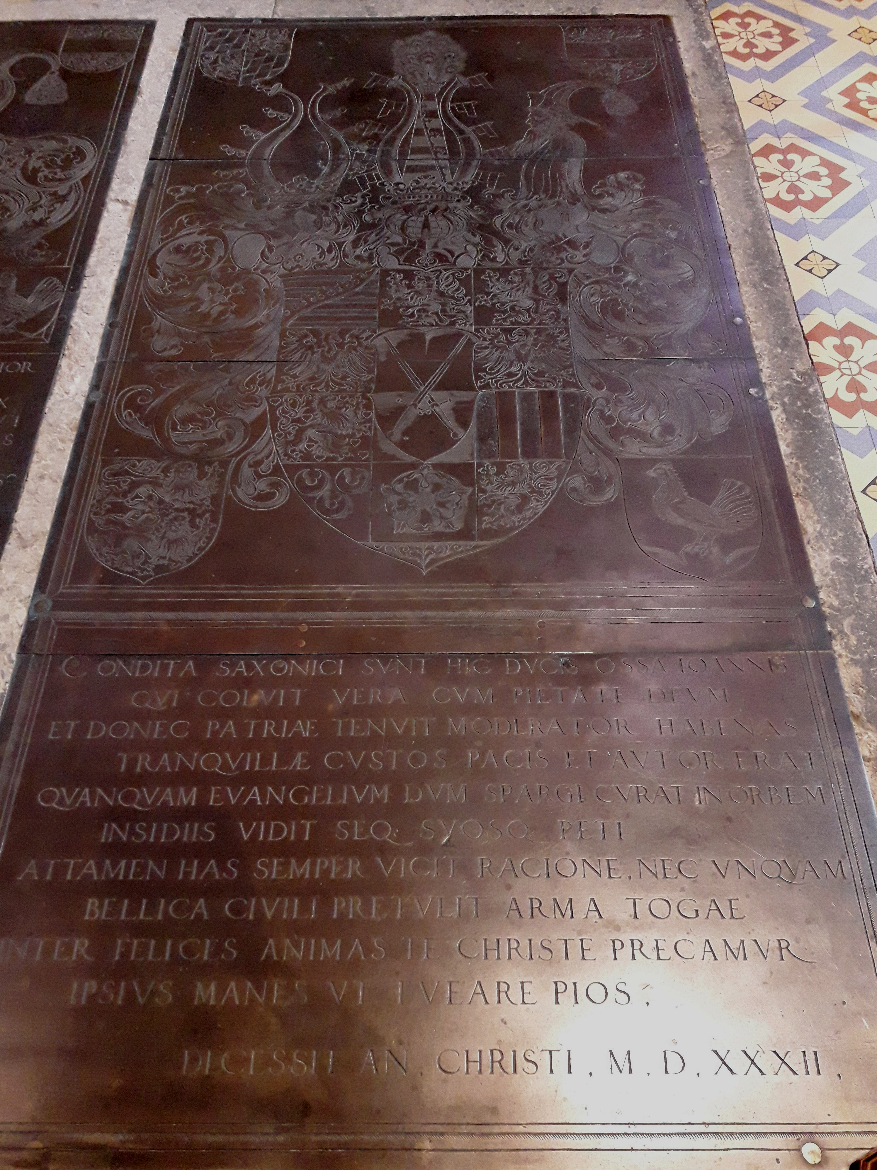 Grabstelle des Kurfürsten Johann "des Beständigen" von Sachsen (1468-1532) vor dem Hauptaltar in der Schlosskirche Wittenberg